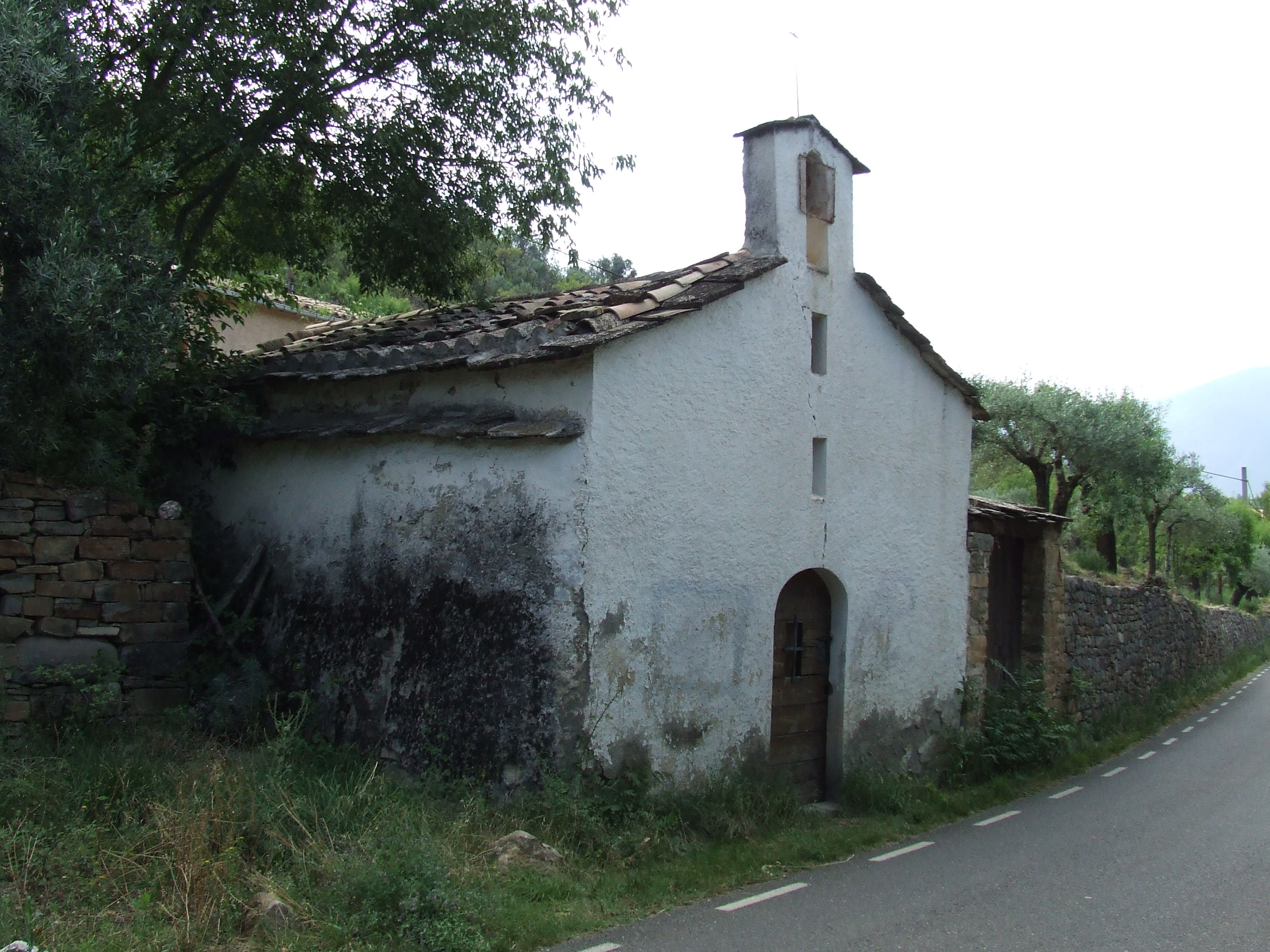 Ermita de la Mare de Déu del Socors (el Pont de Claverol, Conca de Dalt, Pallars Jussà)